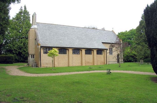 St Martin, Preston, Herts